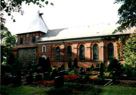 Kirchengebäude in Lütau